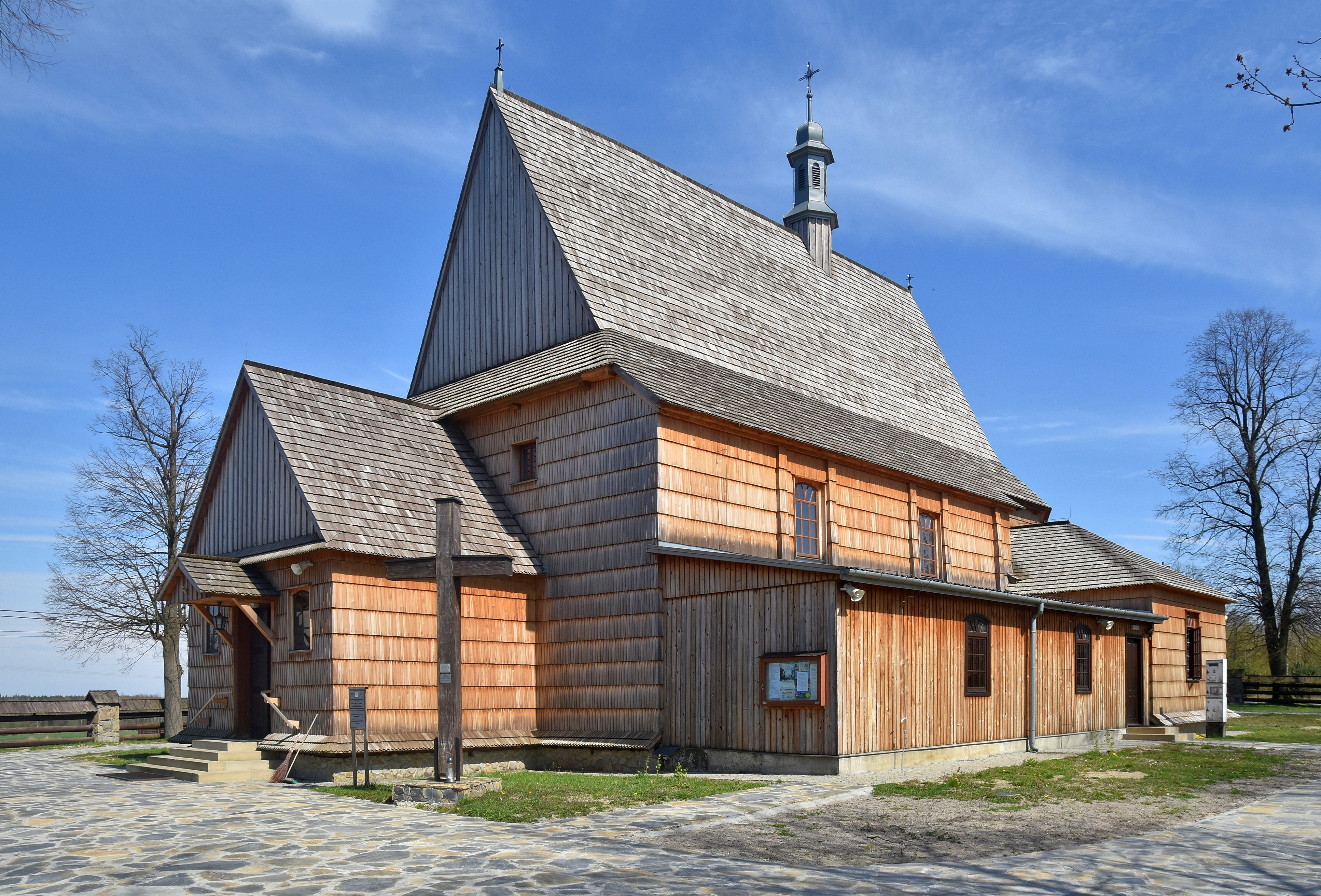 Kościół Trójcy Przenajświętszej w Machowej